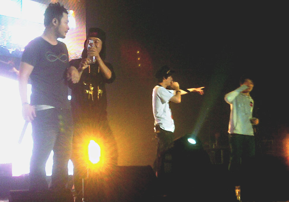 2009년 9월 19일에 열린 [e] PARADE 공연에서의 에픽하이, 왼쪽부터 미쓰라 진, 타블로, DJ 투컷.